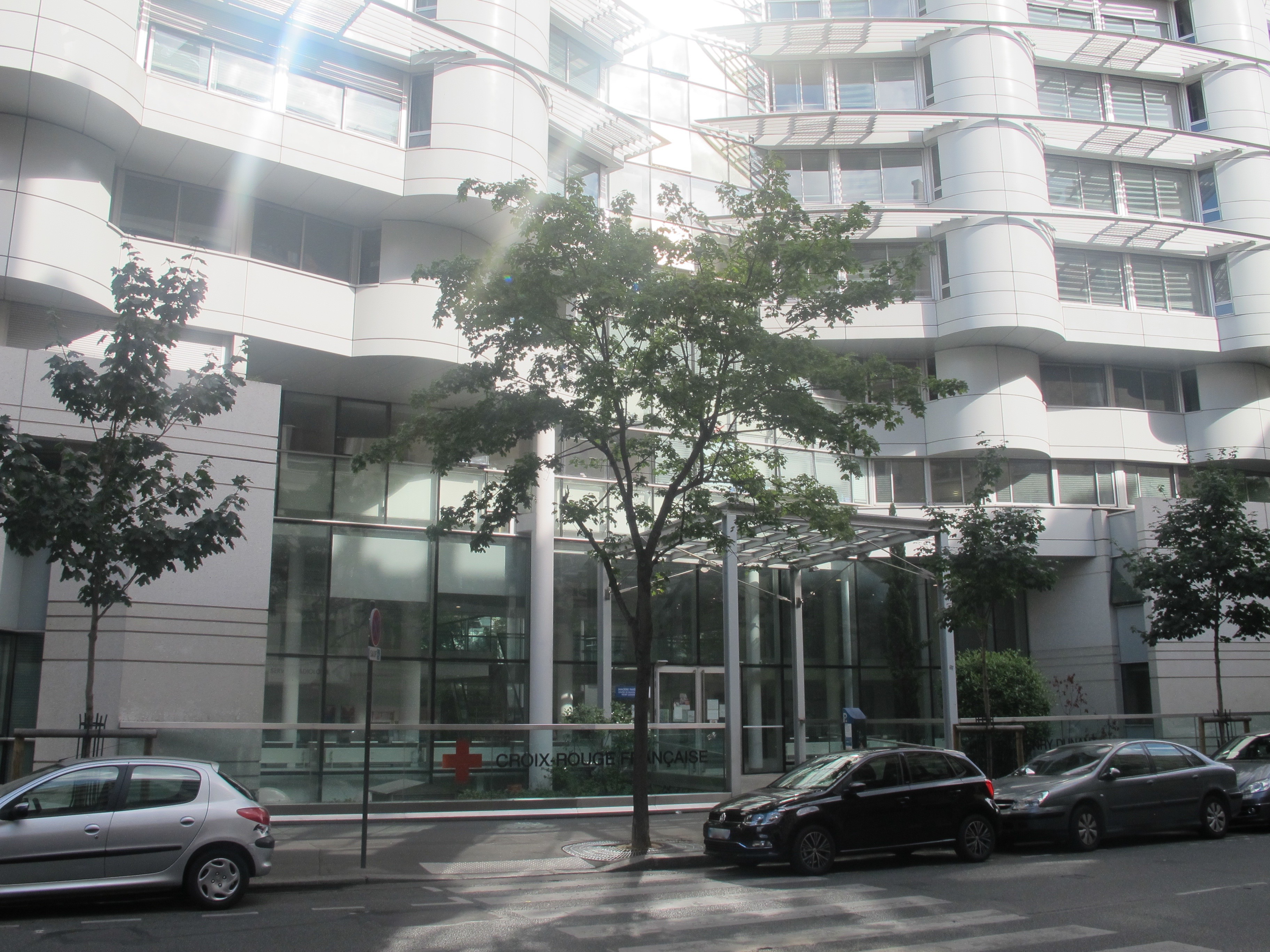 Croix-Rouge française, hôpital Henry Dunant, centre de gérontologie, 95 rue Michel-Ange (Paris, 16e).